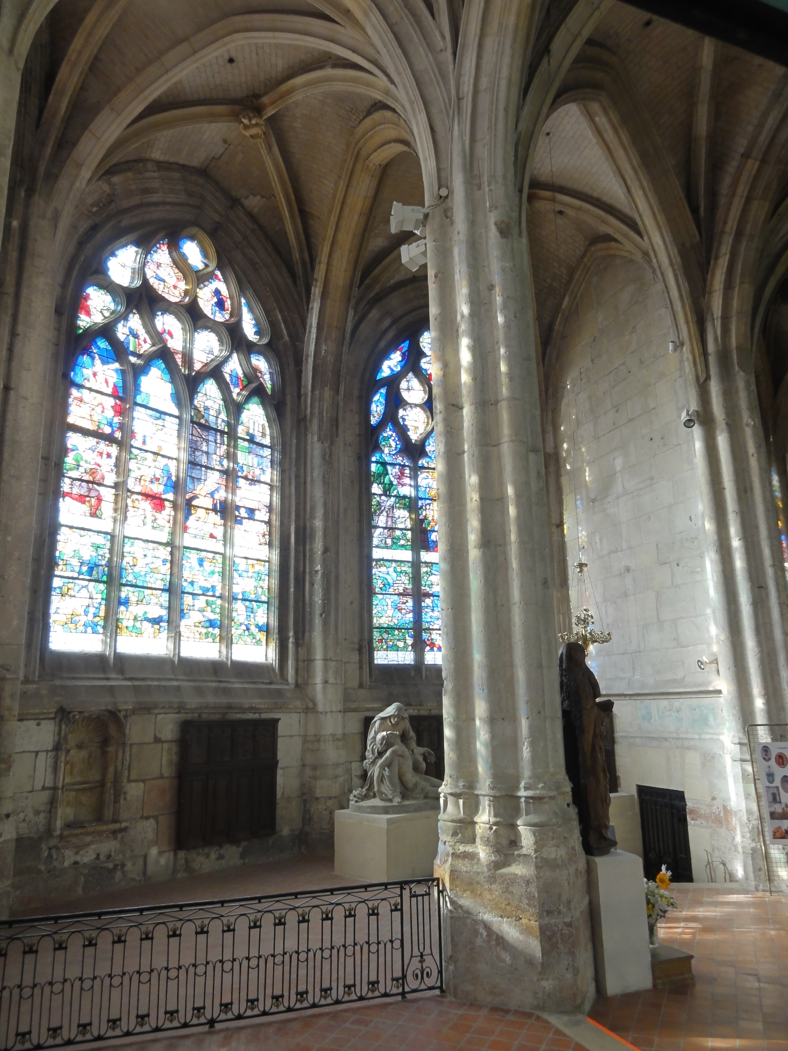 Collatéral sud, chapelle Saint-Nicolas.